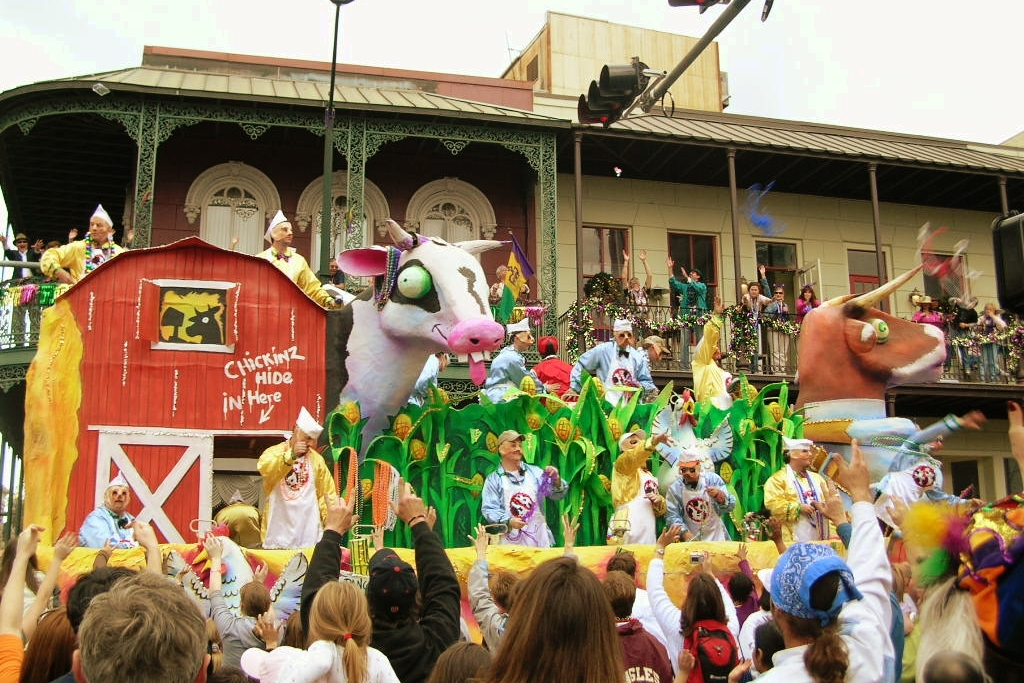 Mardi Gras on Royal Street in Mobile, Alabama.